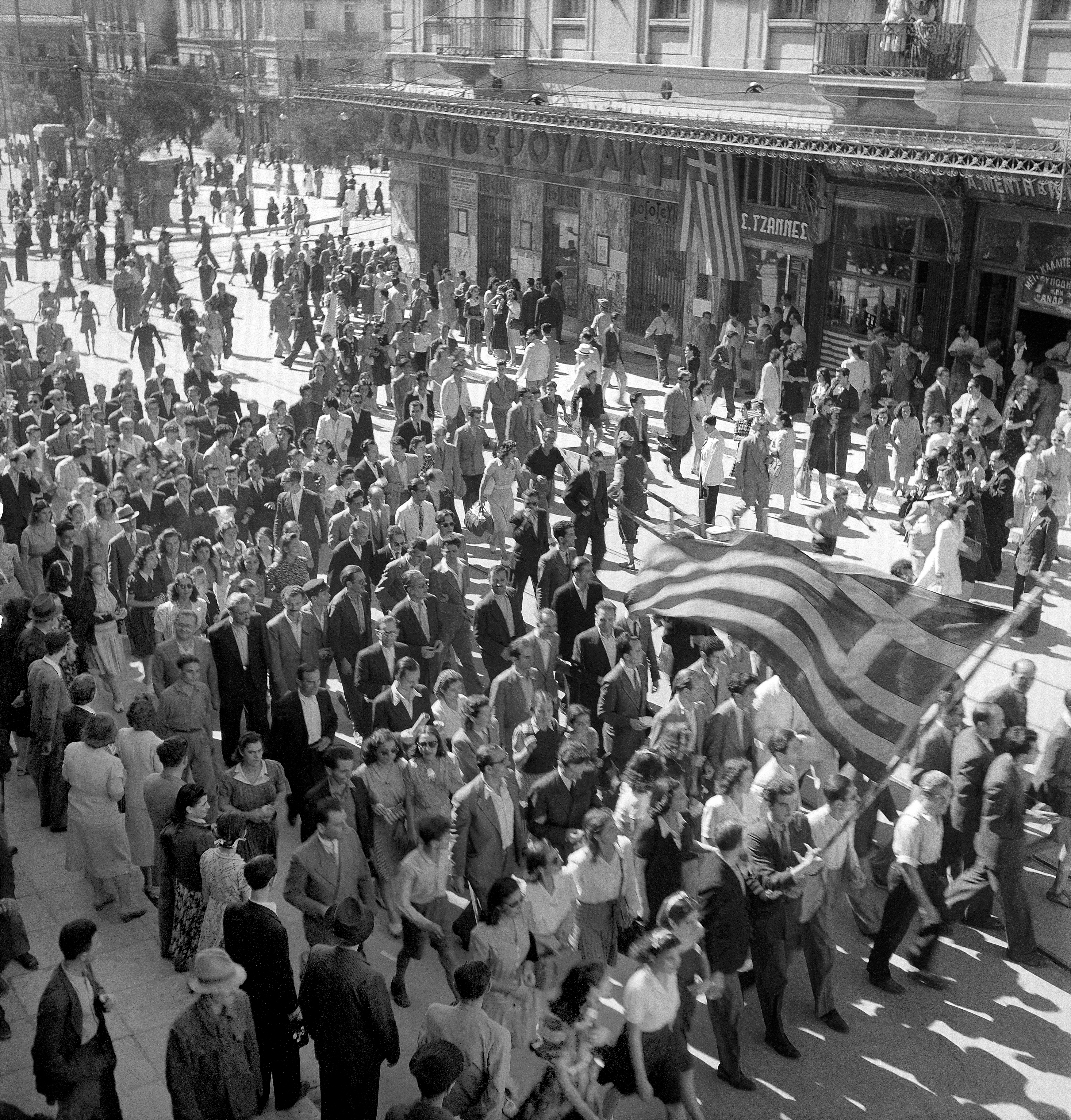 Εκδήλωση και έκθεση στο ΥΠΕΞ για τα 70 χρόνια από την κήρυξη πολέμου εναντίον της χώρας μας από τις δυνάμεις του άξονα Event and exhibition at the Foreign Ministry marking the 70th anniversary of the Axis powers’ declaration of war on Greece